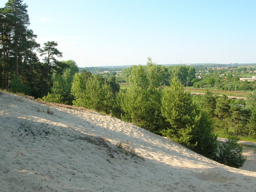 Zbocze piaszczytej terasy pradoliny Wisły w pobliżu Łęgnowa